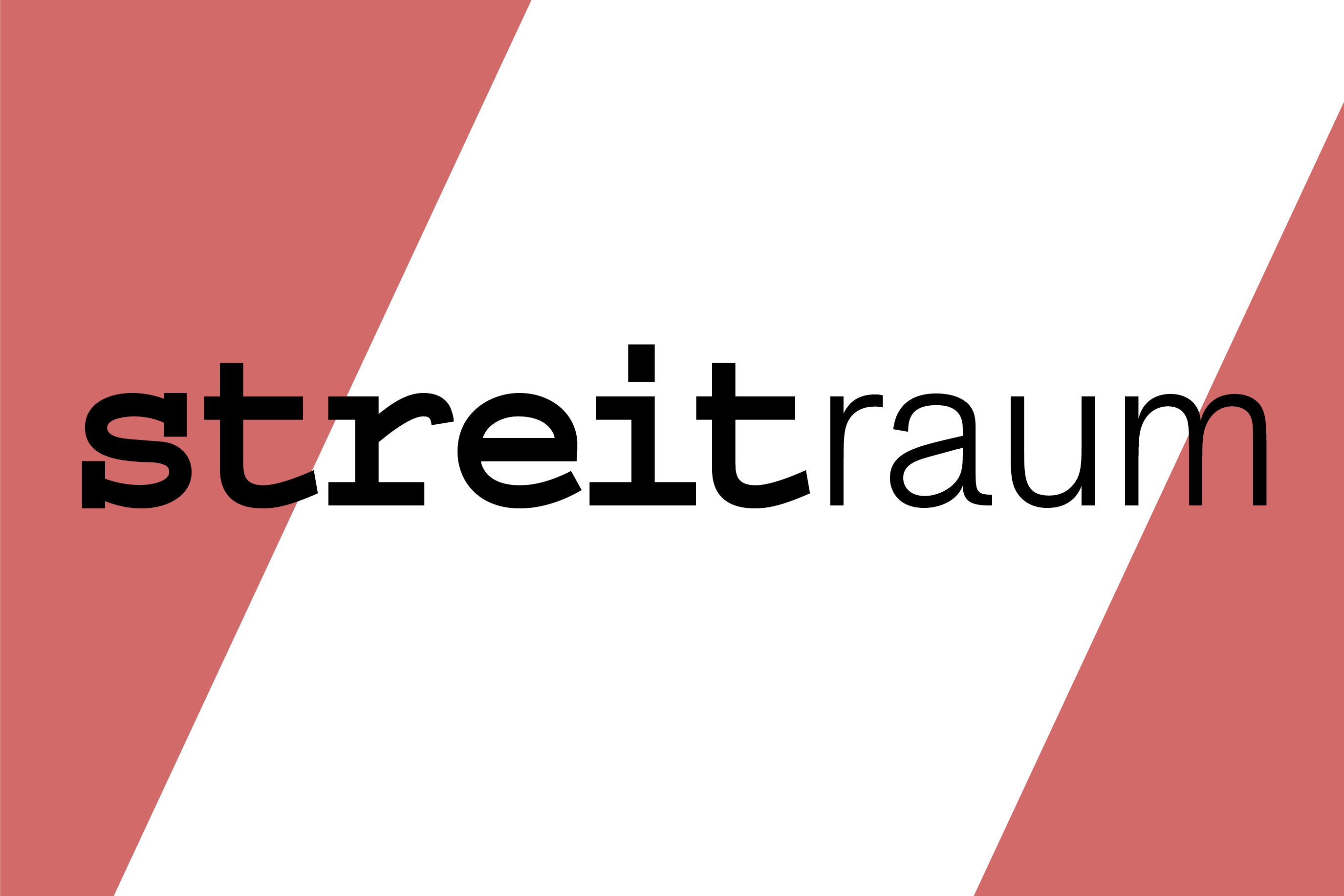 Textlogo Veranstaltungsreihe Streitraum Schaubühne Berlin